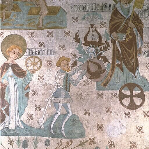 Korets nordvägg, målad av Johannes Rosenrodh. Motiv: Tensta kyrka Kategori: (03) Kalkmålningar Korets nordvägg, målad av Johannes Rosenrod (verksam i mitten av 1400-talet). Målningen föreställer riddaren och riksrådet, lagmannen Bengt Jönsson Oxenstierna, som var kyrkans patronus. Bengt Jönsson (Oxenstierna)s sätesgård var Salsta i Lena socken i Norunda härad, Uppland. Han gjorde stora donationer till Tensta kyrka i Uppland och finns därför avbildad i en kalkmålning på kyrkväggen i form av ett s.k. donatorsporträtt, vilket i likhet med cirka 60 % av resten av kyrkans målningar, är målat av Johannes Rosenrod. När Johannes Rosenrod dekorerade Tensta kyrka 1437 i koret och i delar av långhuset målade han också av uppdragsgivaren, lagman Bengt Oxenstierna till Salsta, med släktvapnet framsträckt mot S:t Per. "Hjulet" nedanför helgonets fötter är ett konsekrationskors (invigningskors), anbragt där biskopen stänkt helig olja vid kyrkans återinvigning.[1][2][3]